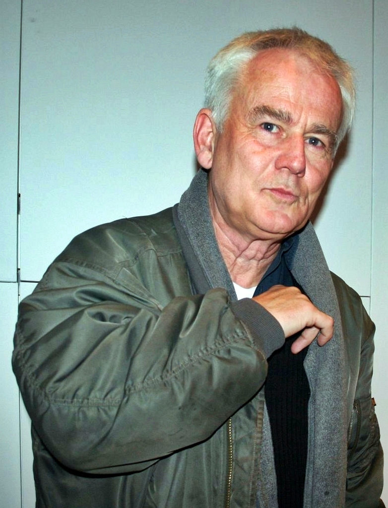 Fotograf Jim Rakete (*1951) bei seiner Ausstellung "1/8 sec." im Deutschen Filmmuseum in Frankfurt/Main